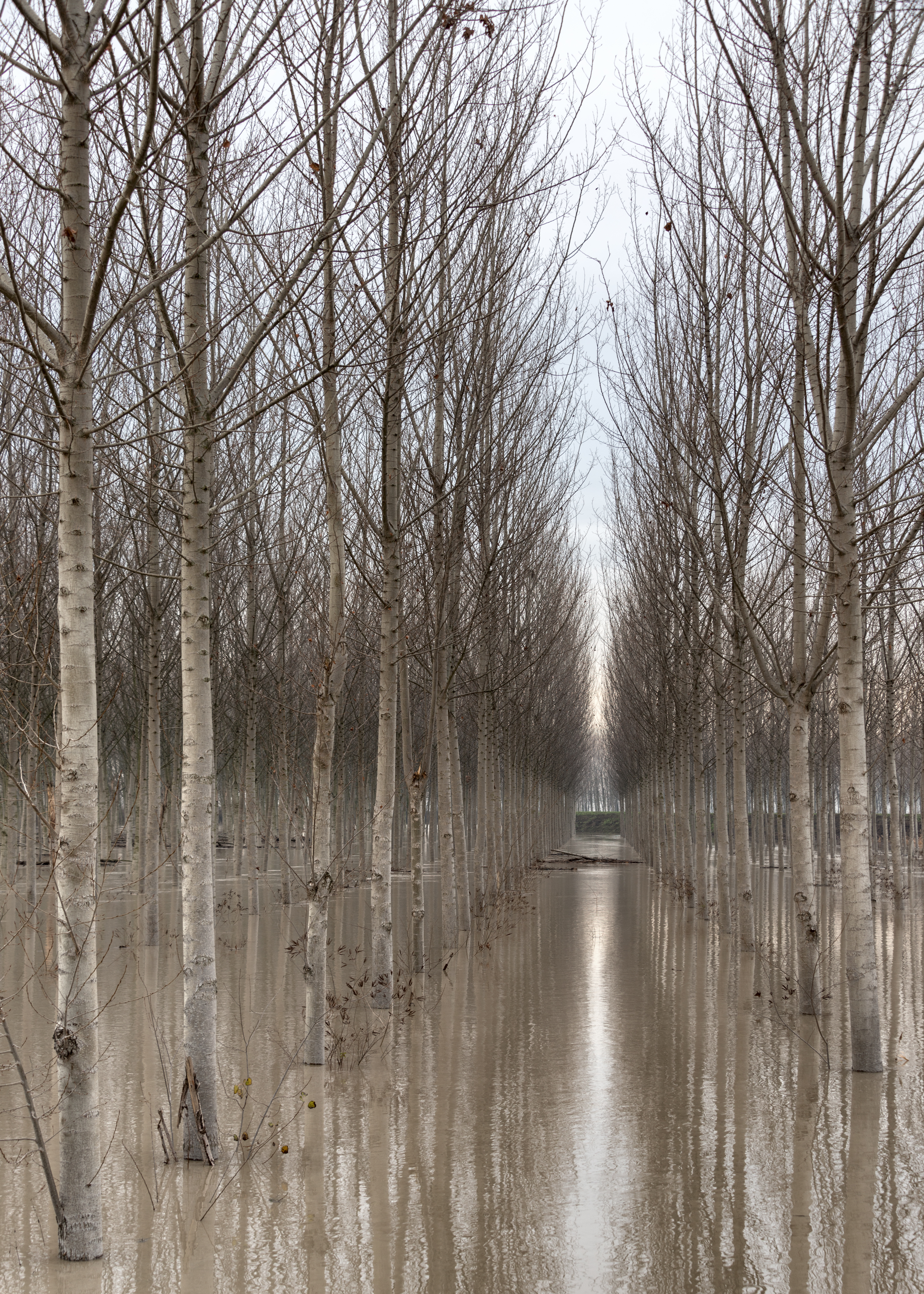 Piena del Secchia - Soliera, Modena, Italia - 12 Dicembre 2017